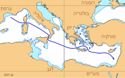 אוניית המעפילים בן הכט - מסלול